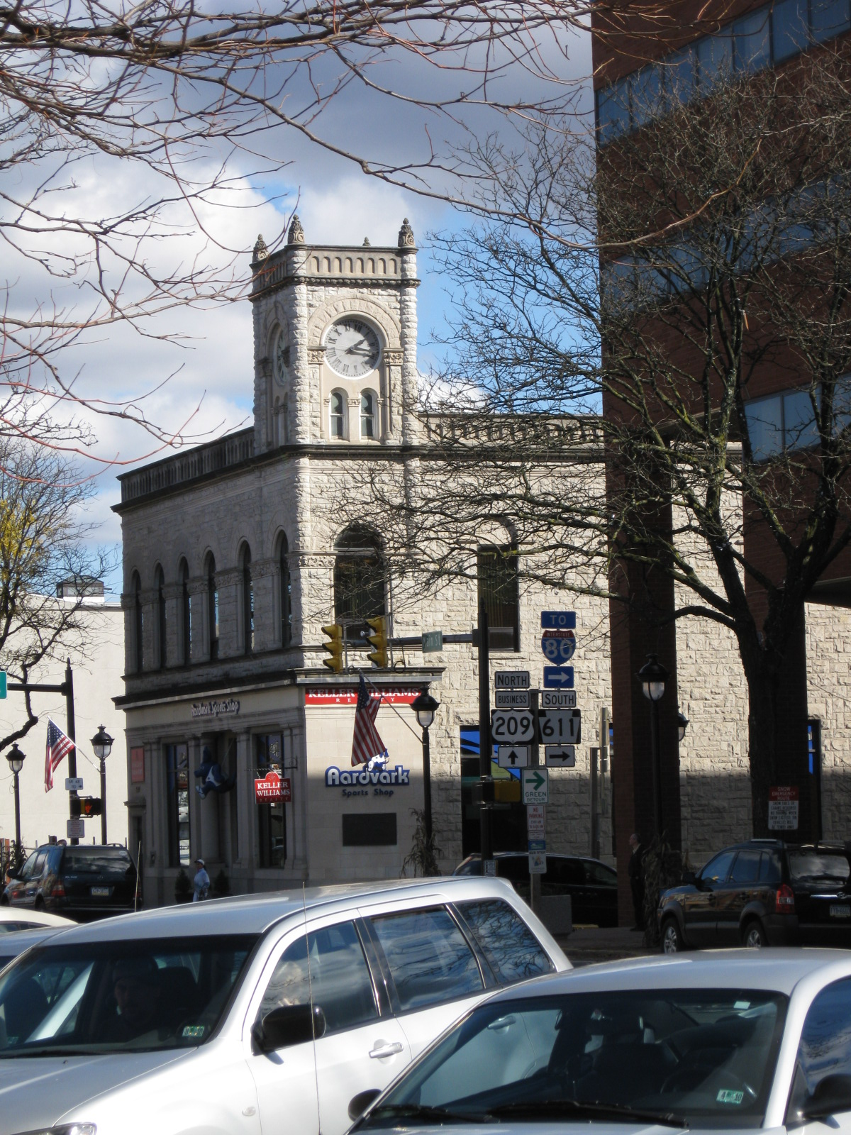 Stroudsburg, Pennsylvania